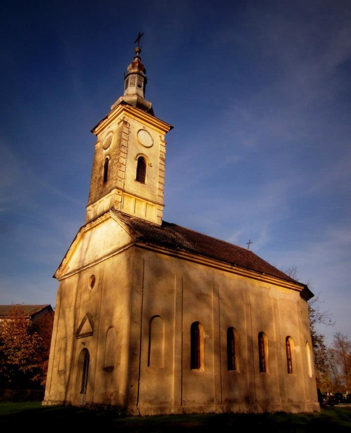 Стара црква преображења господњег у Гламочанима код Српца